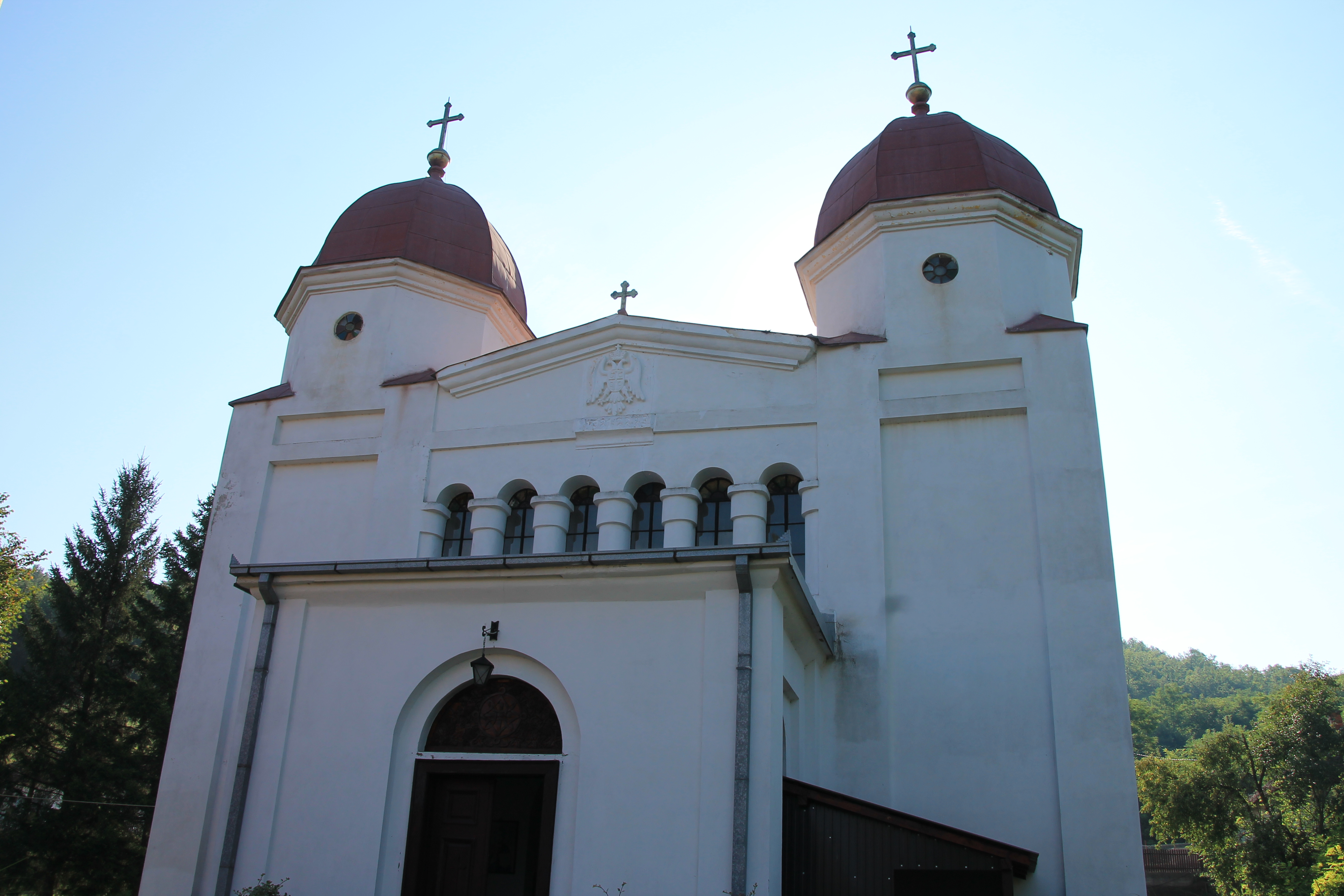 Crkva Rođenja Presvete Bogorodice (Grivac)